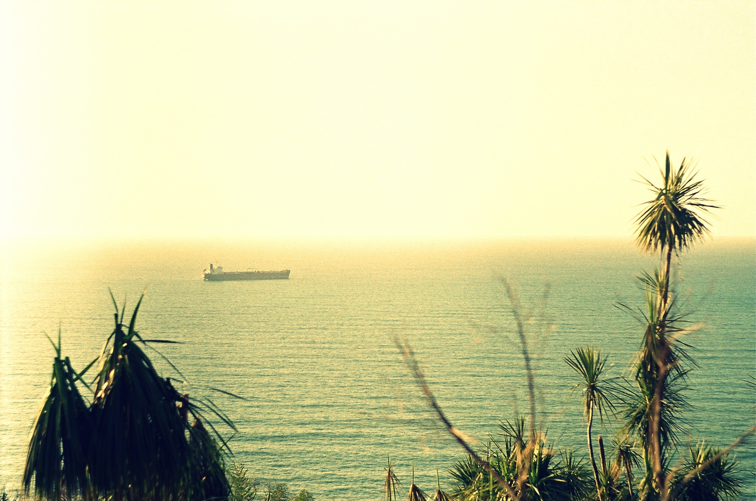 Black Sea. Batumi, Georgia